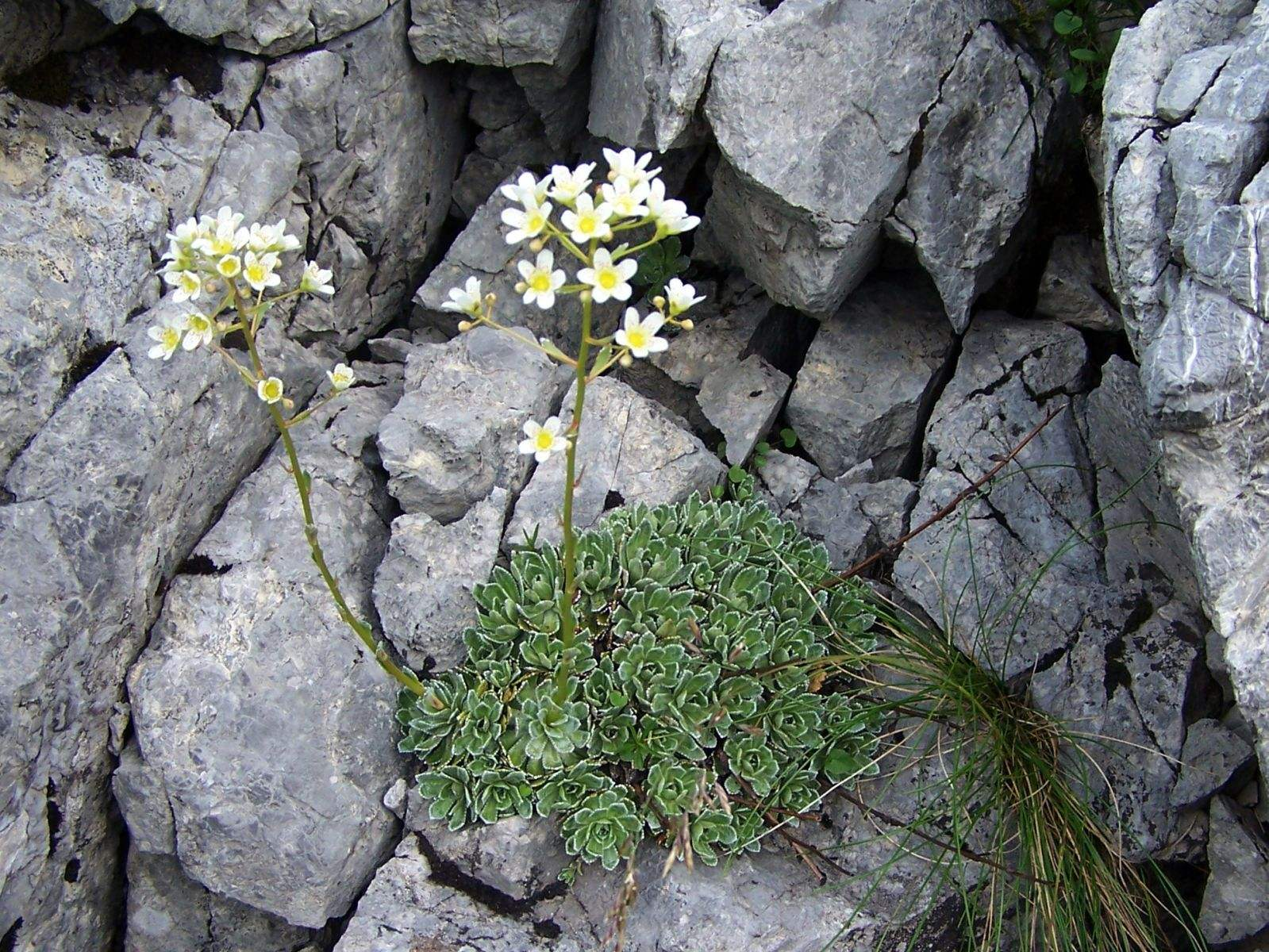 Saxifraga paniculata (pl. skalnica gronkowa), habitat: Tatra Mountains, przełęcz Liliowe